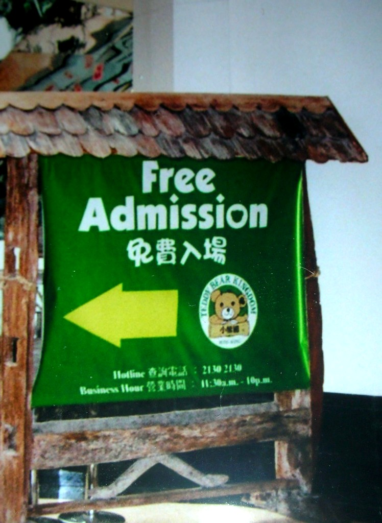 Teddy Bear Kingdom, Hong Kong 香港小熊國入口指示牌